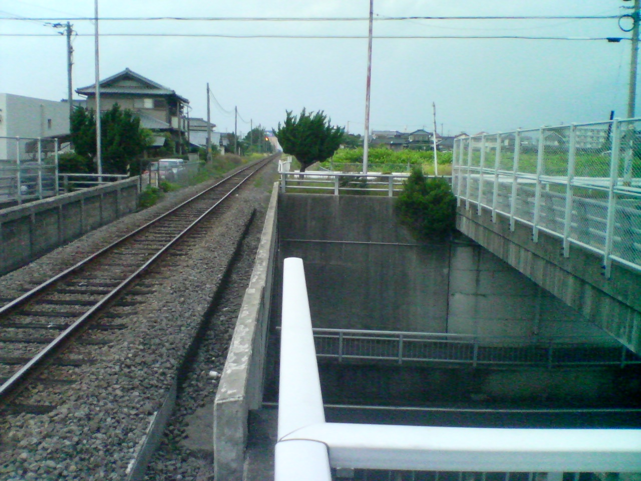 国道444号線架道橋より新大村駅予定地を竹松駅方面に望む。